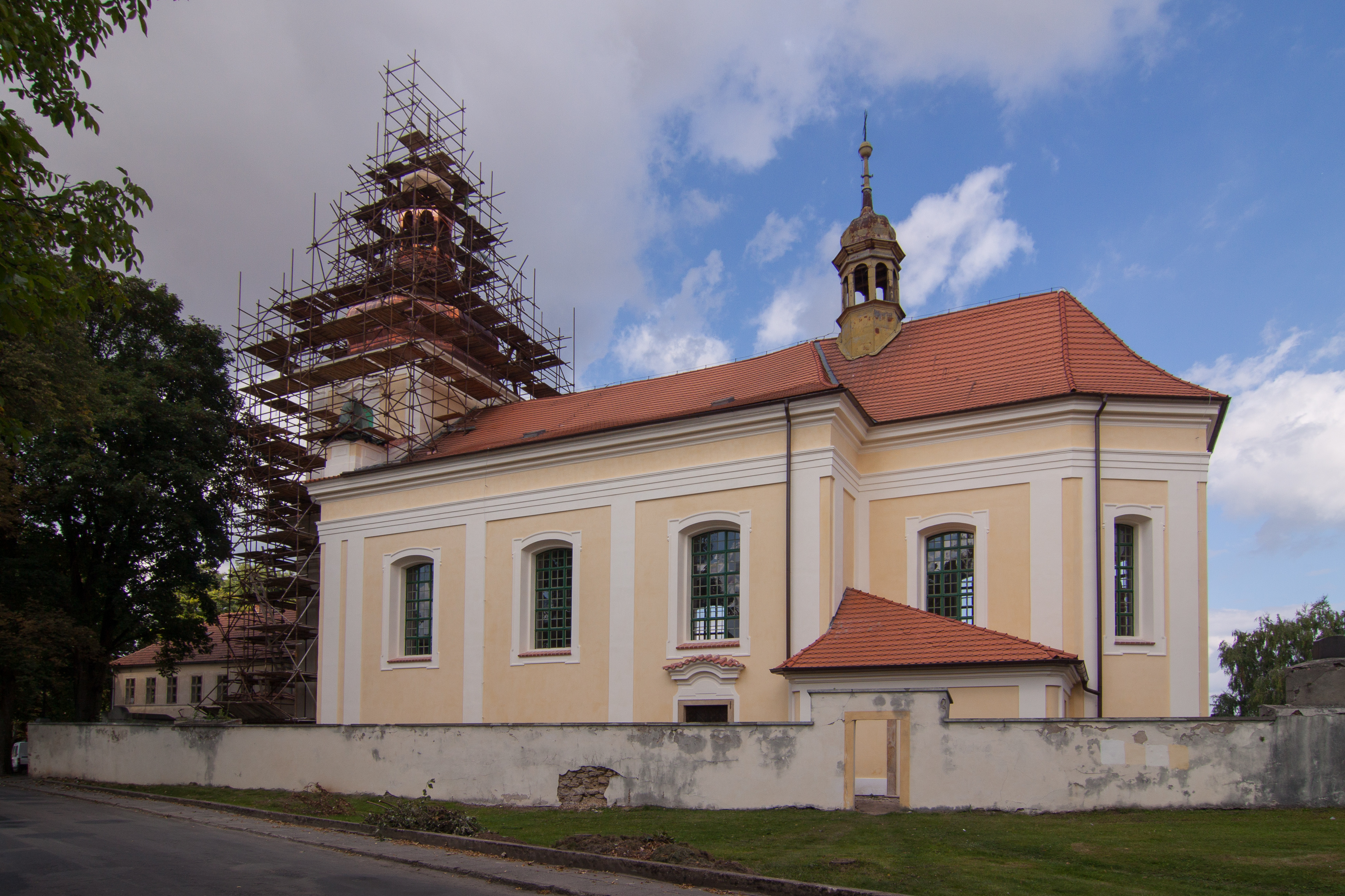 Kostel Nanebevzetí P. Marie, náves, Chorušice